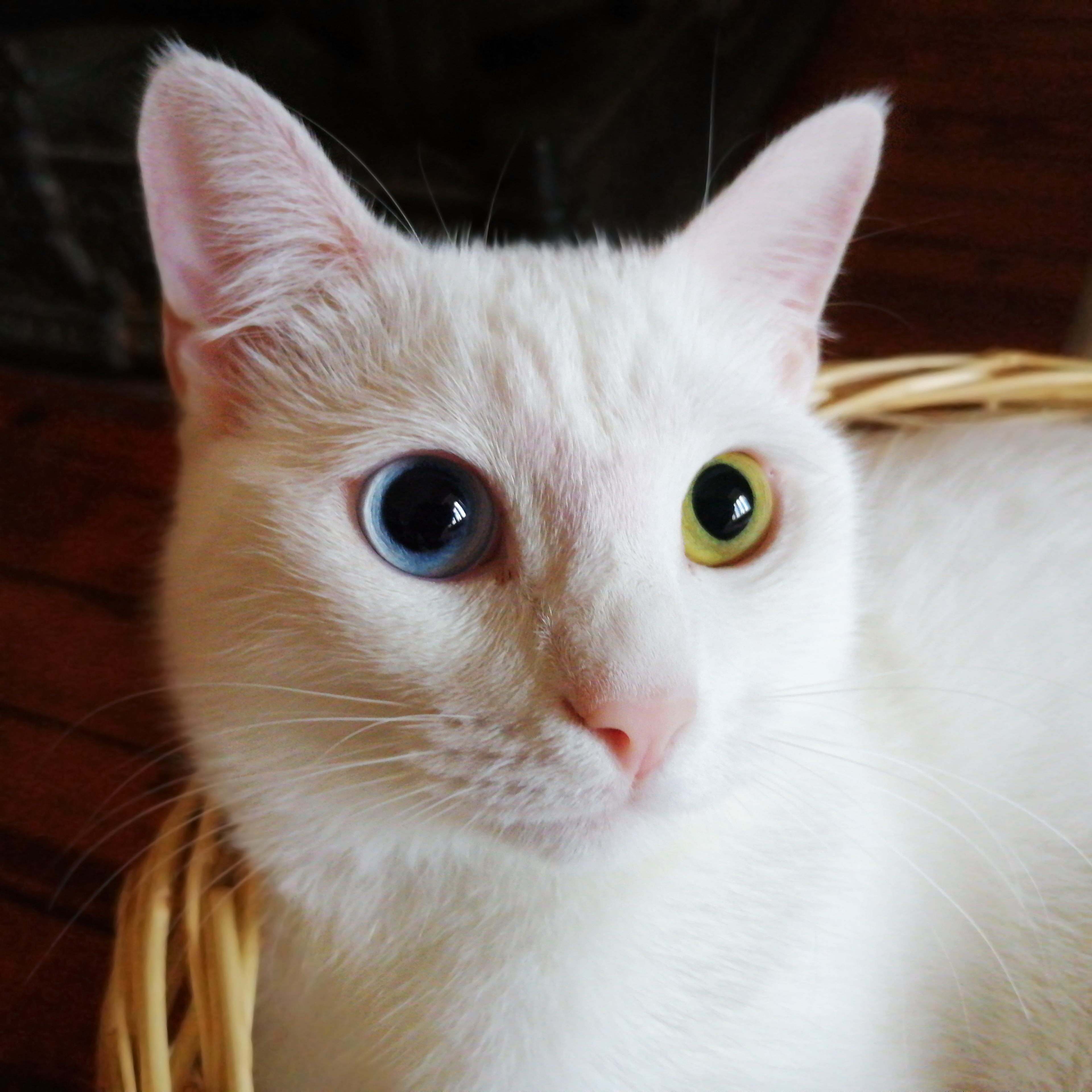 Van Kedisi